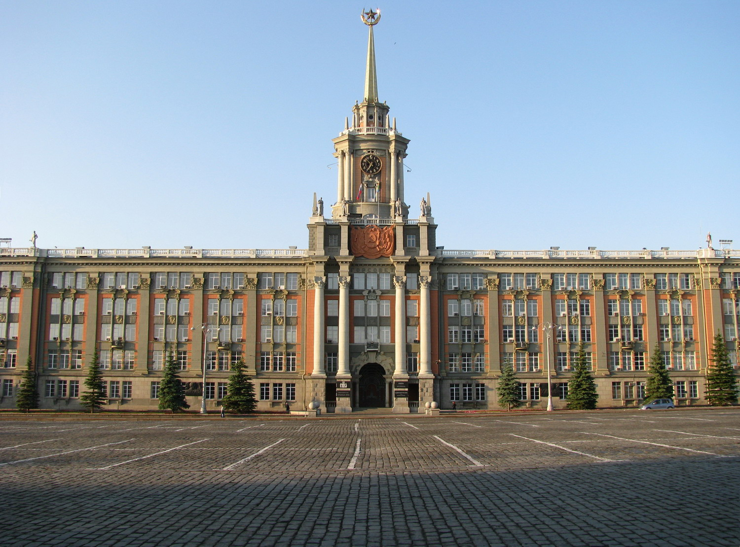 Администрация Екатеринбурга, Площадь 1905 года.